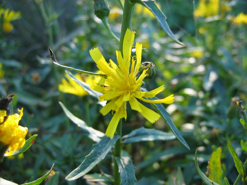 Doldiges Habichtskraut (Hieracium umbellatum)